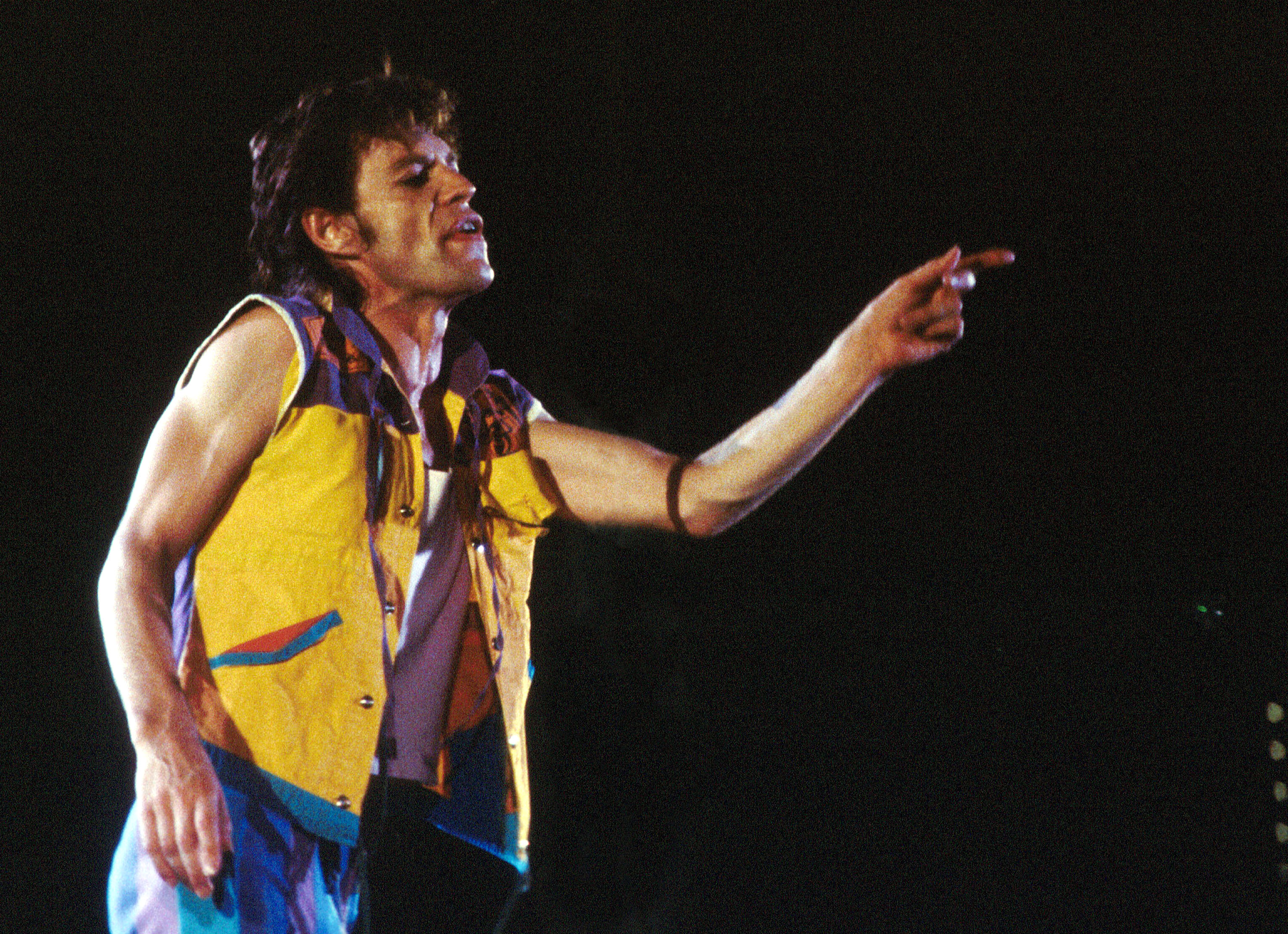 Concerto dei Rolling Stones a Torino, 1982, Mick Jagger